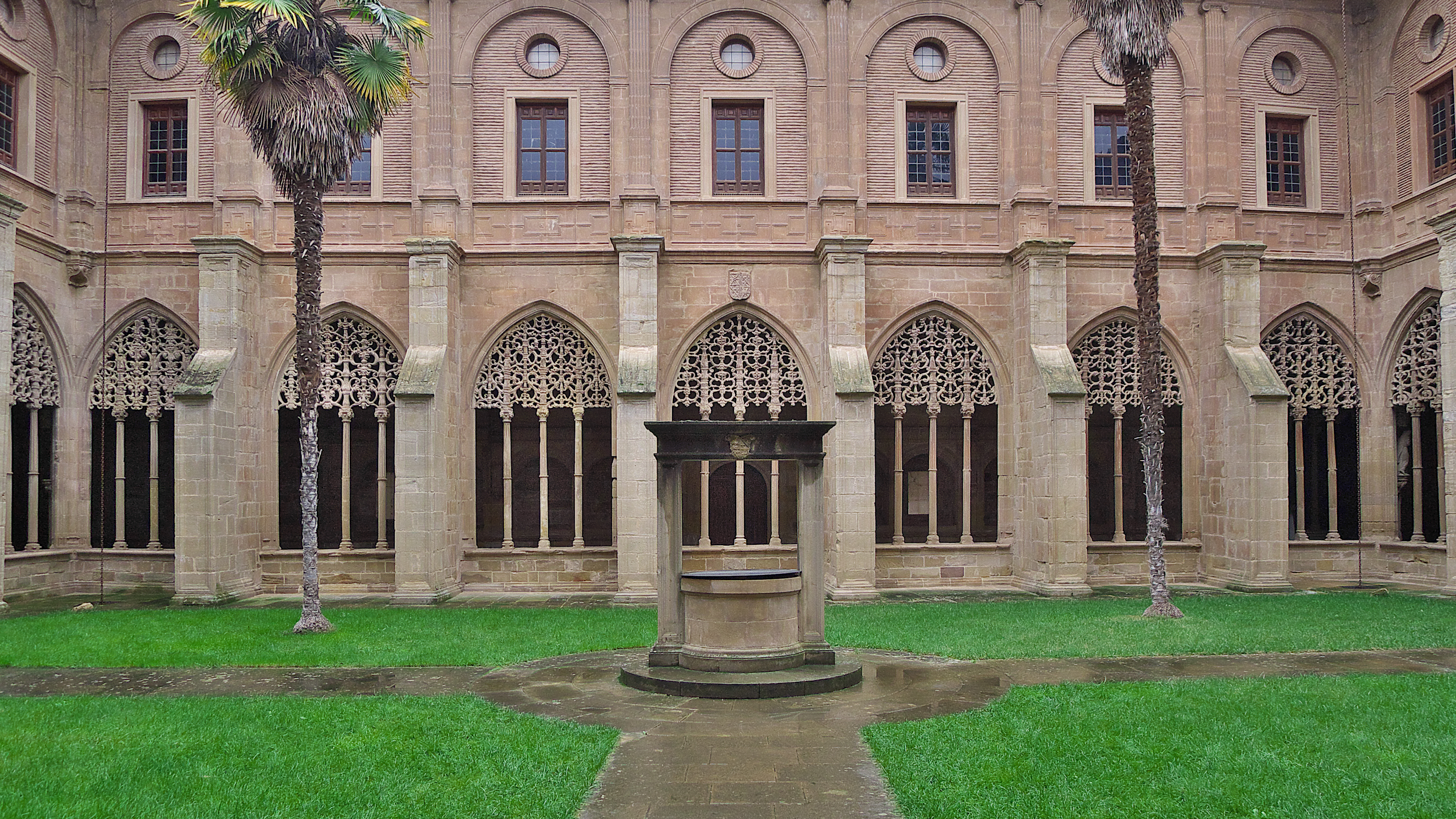 A principios del siglo XVI los caballeros nobles elegían este claustro para sus enterramientos. Sus tracerías platerescas son admiradas en la etapa del gótico decadente.